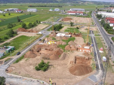 Der erste Bauabschnitt des Baugebiet Tafeläcker